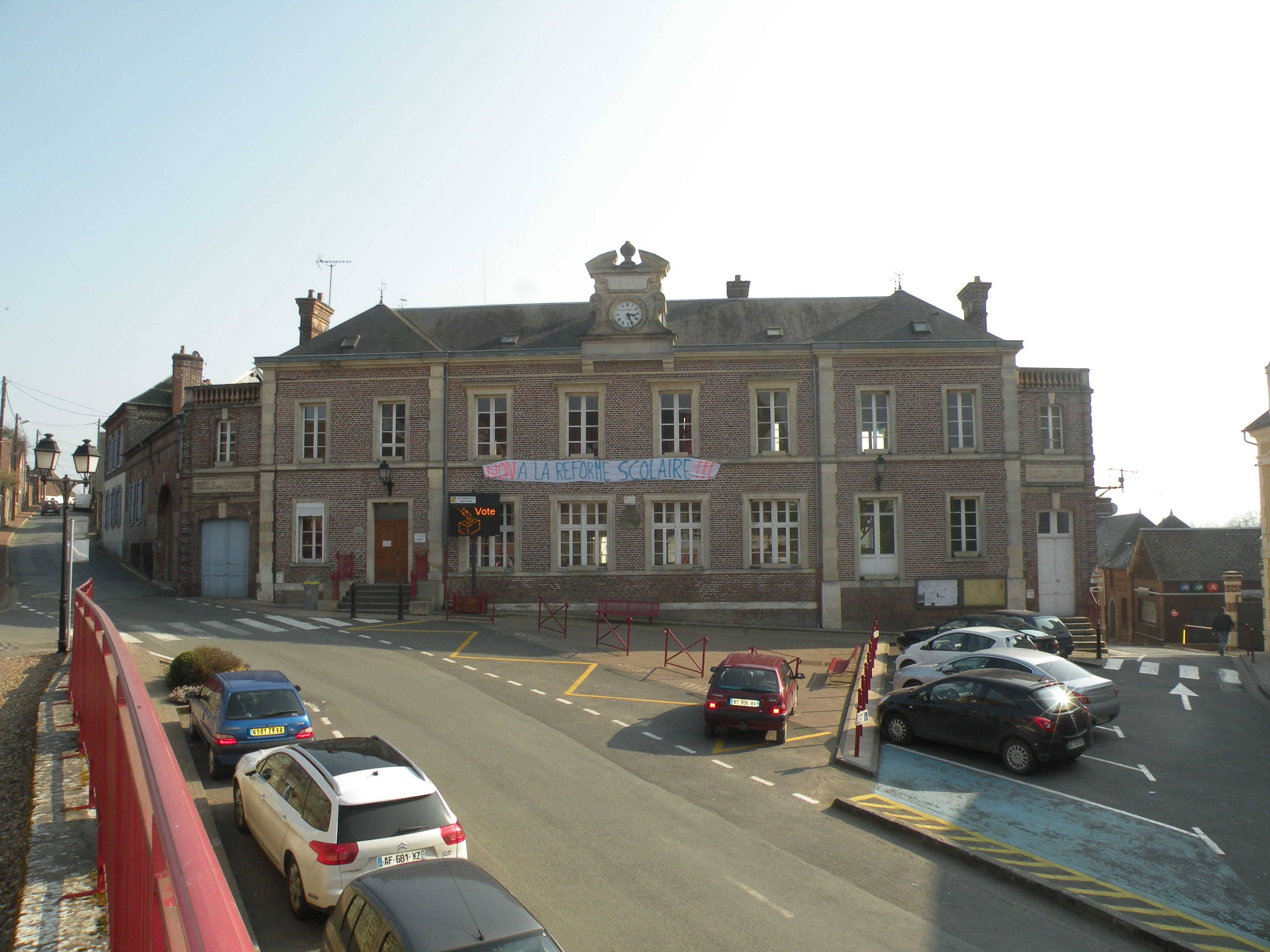 Lachapelle-aux-Pots école